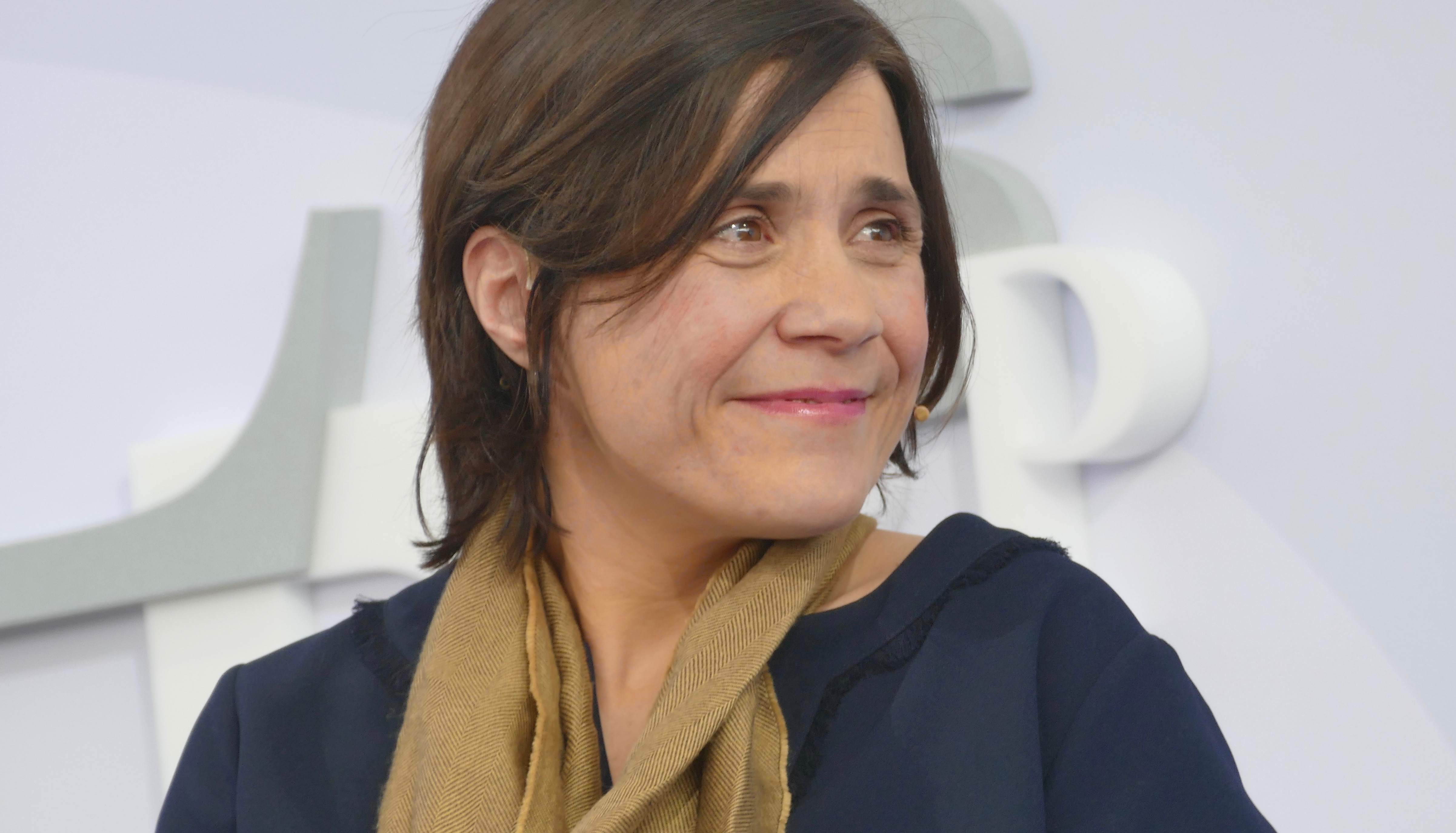 Bénédicte Savoy auf der Leipziger Buchmesse 2018